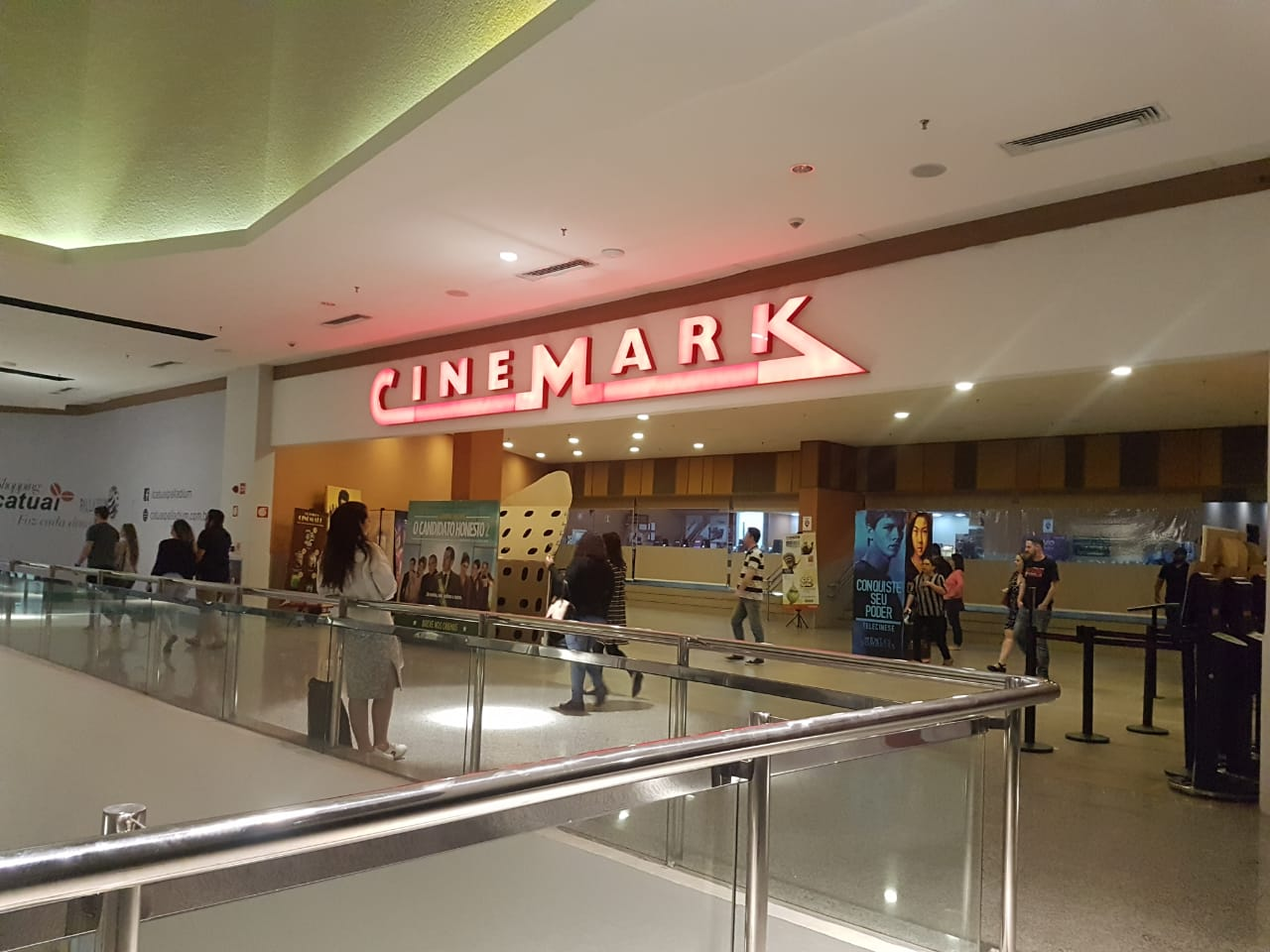 Vista da entrada do Cinemark de Foz do Iguaçu